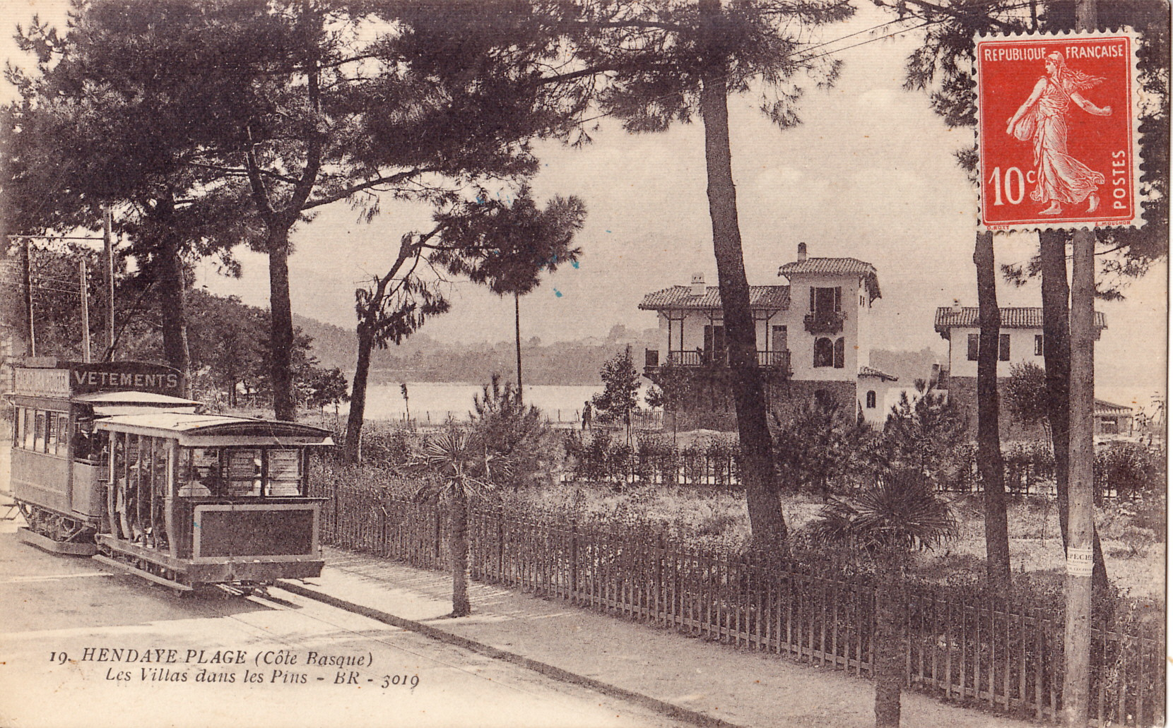 Carte postale ancienne éditée par BR n°3019 et n°19 : HENDAYE-PLAGE (côte Basque) : Villas dans les Pins